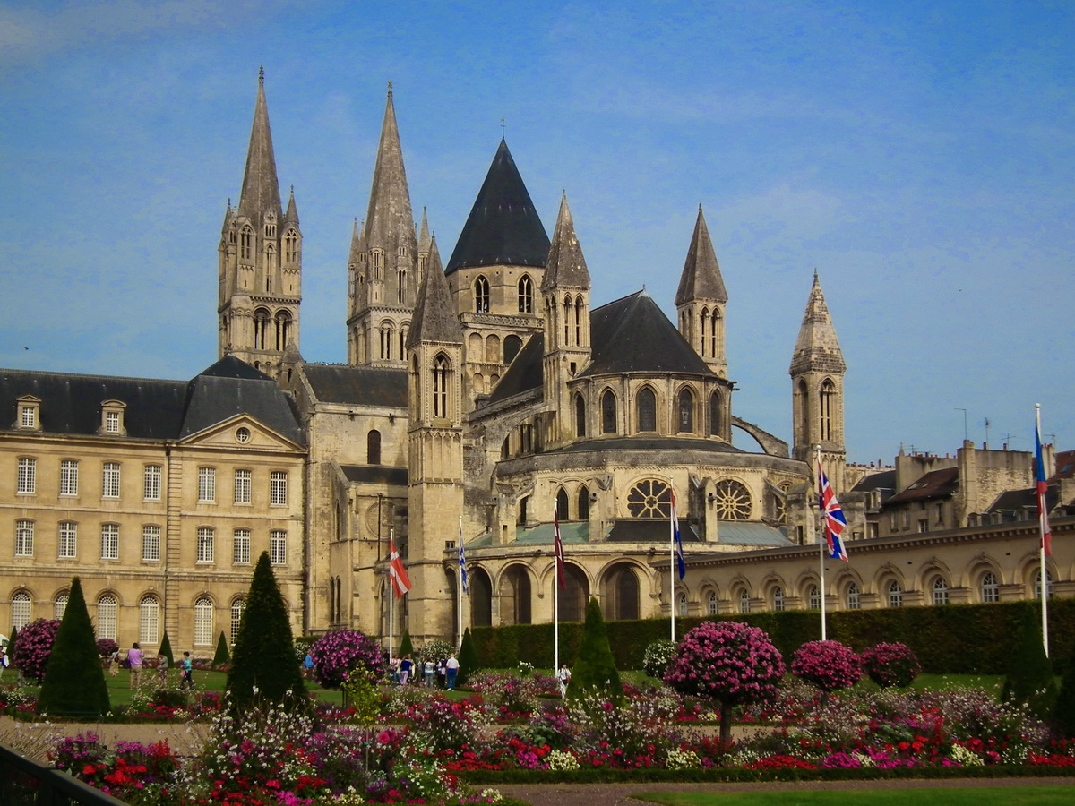 Abbaye aux Hommes, Caen, France